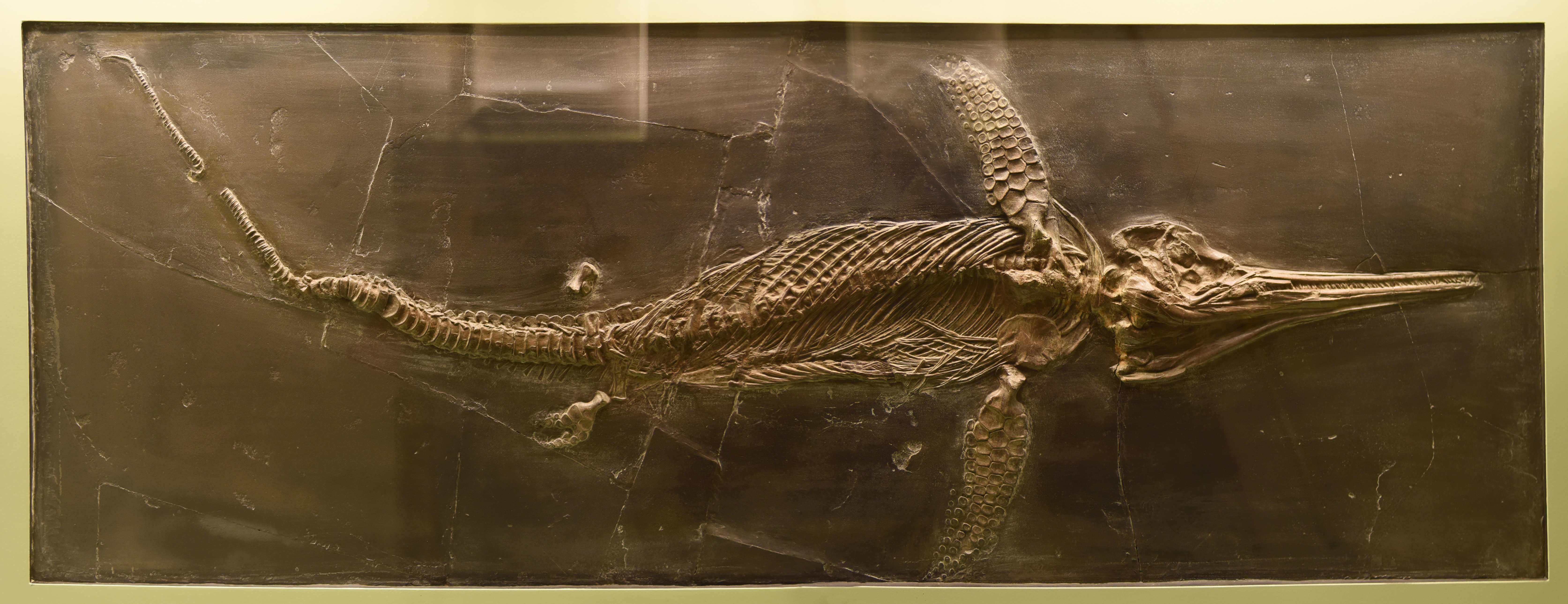 Stenopterygius crassicostatus. Fundort Holzmaden (Baden-Württemberg, Deutschland) Austellungsort: Naturhistorisches Museeum Basel